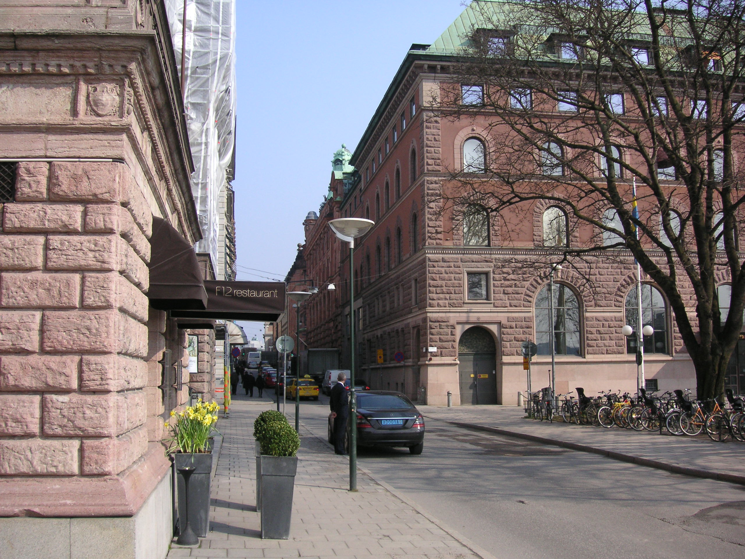 Fredsgatan i Stockholm mot öst, Rosenbad syns till höger.